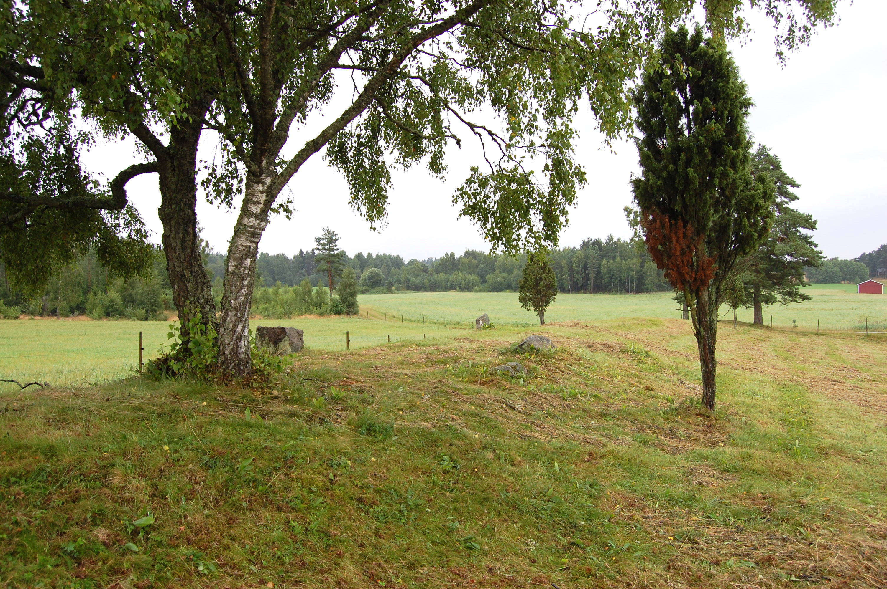 Gräberfeld von Vrigstad, südlicher Teil